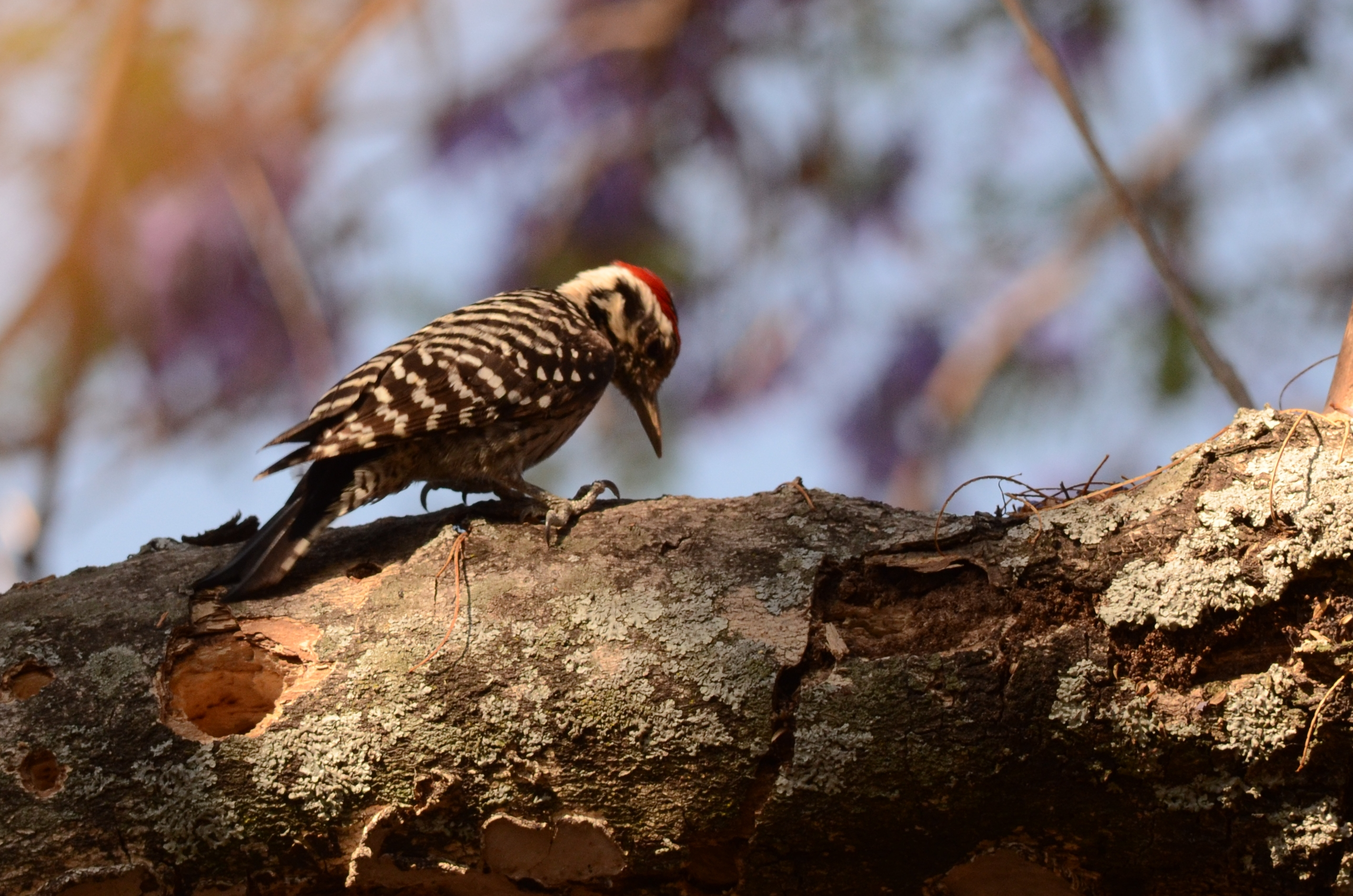 Picoides scalaris